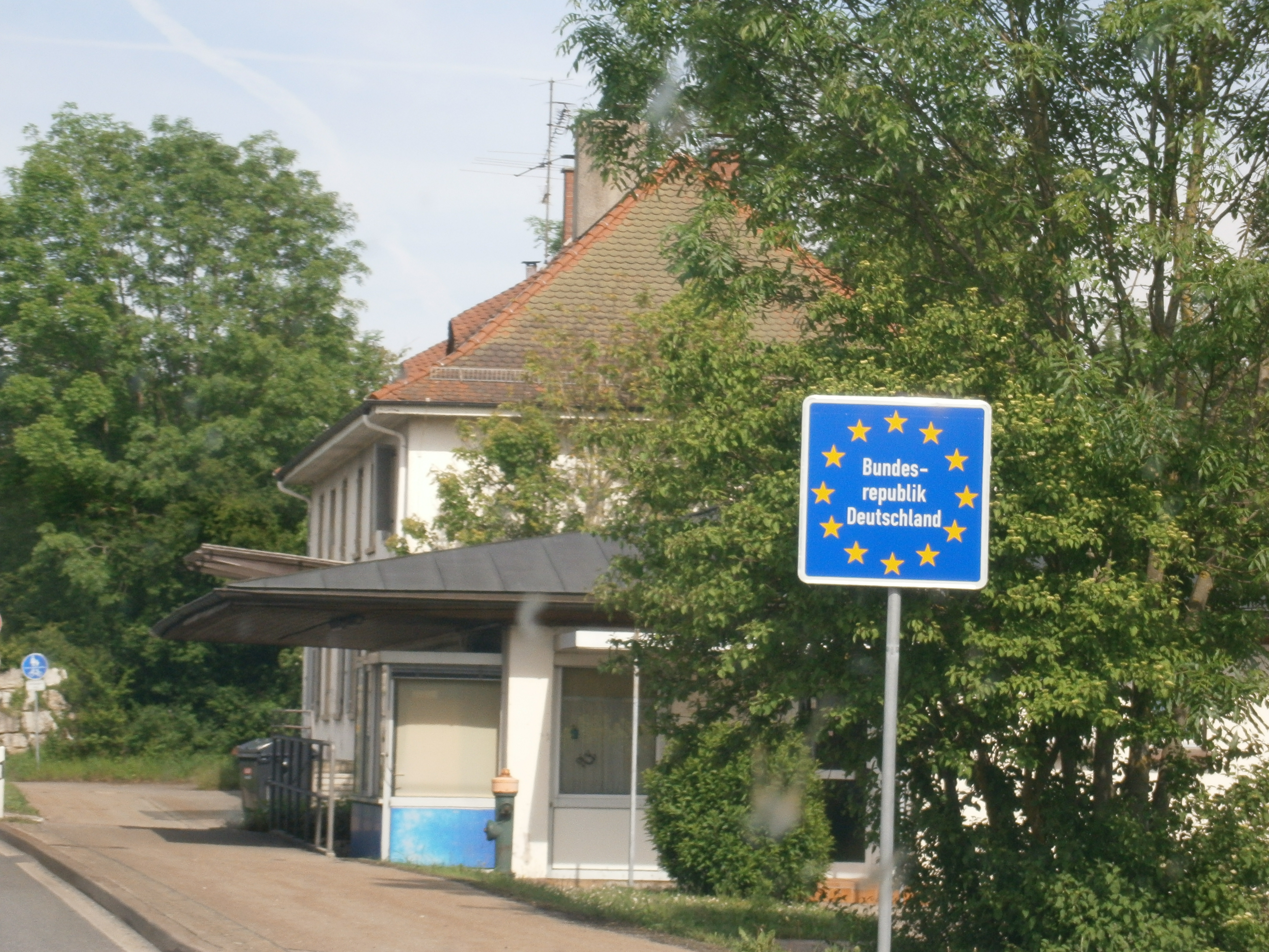 Ein Schild, das die Grenze signalisiert.